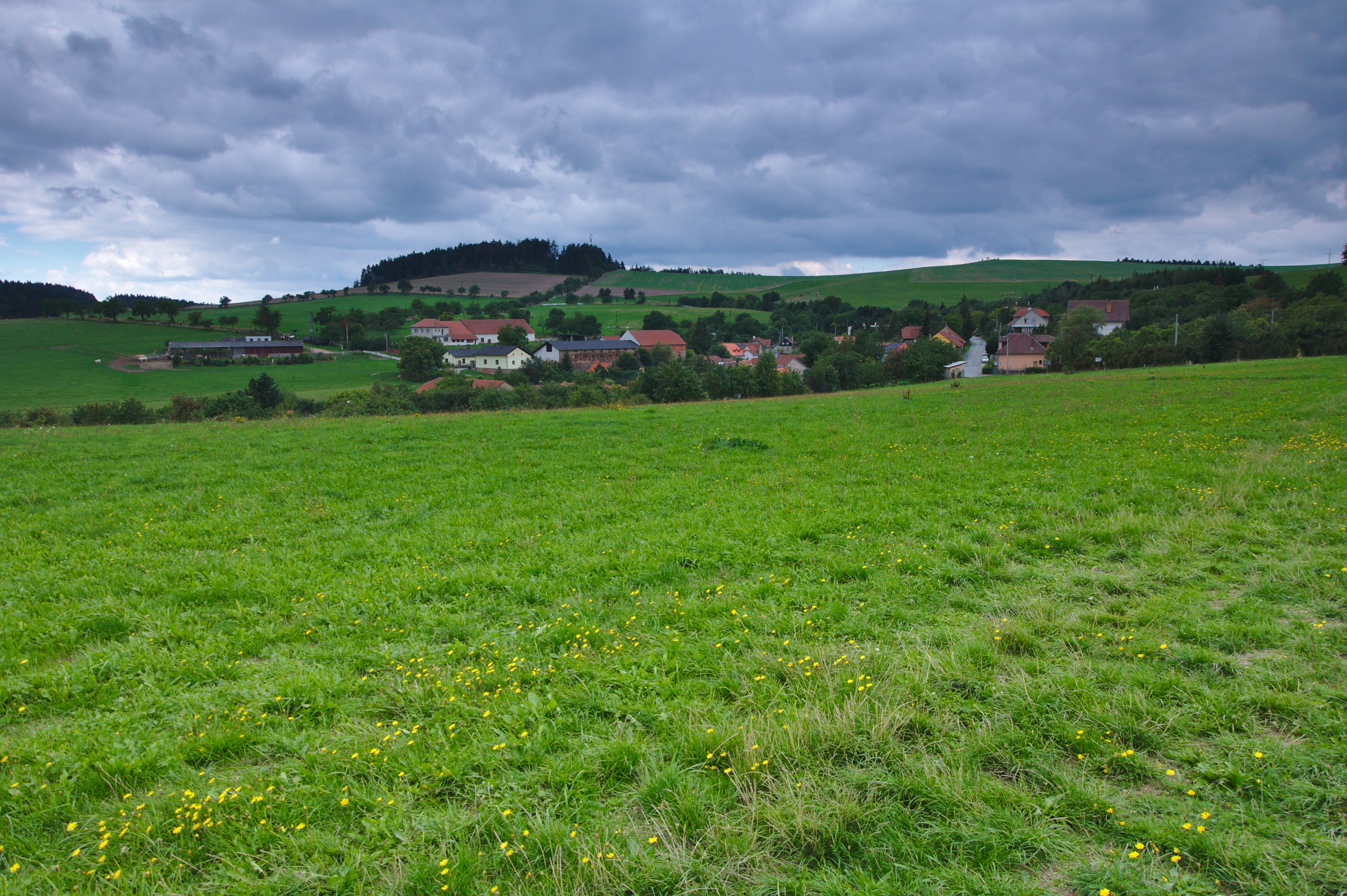 Vesnice od severovýchodu, Kunčina Ves, okres Blansko